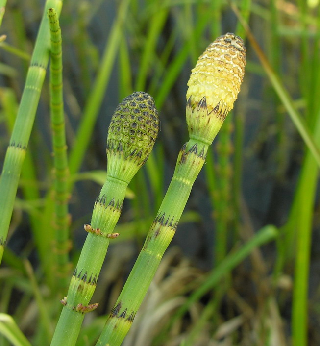 Balinis asiūklis (Equisetum fluviatile) Šeima. Asiūkliniai (Equisetaceae) Foto: Algirdas, 2006 m. birželio 3 d., Lietuva